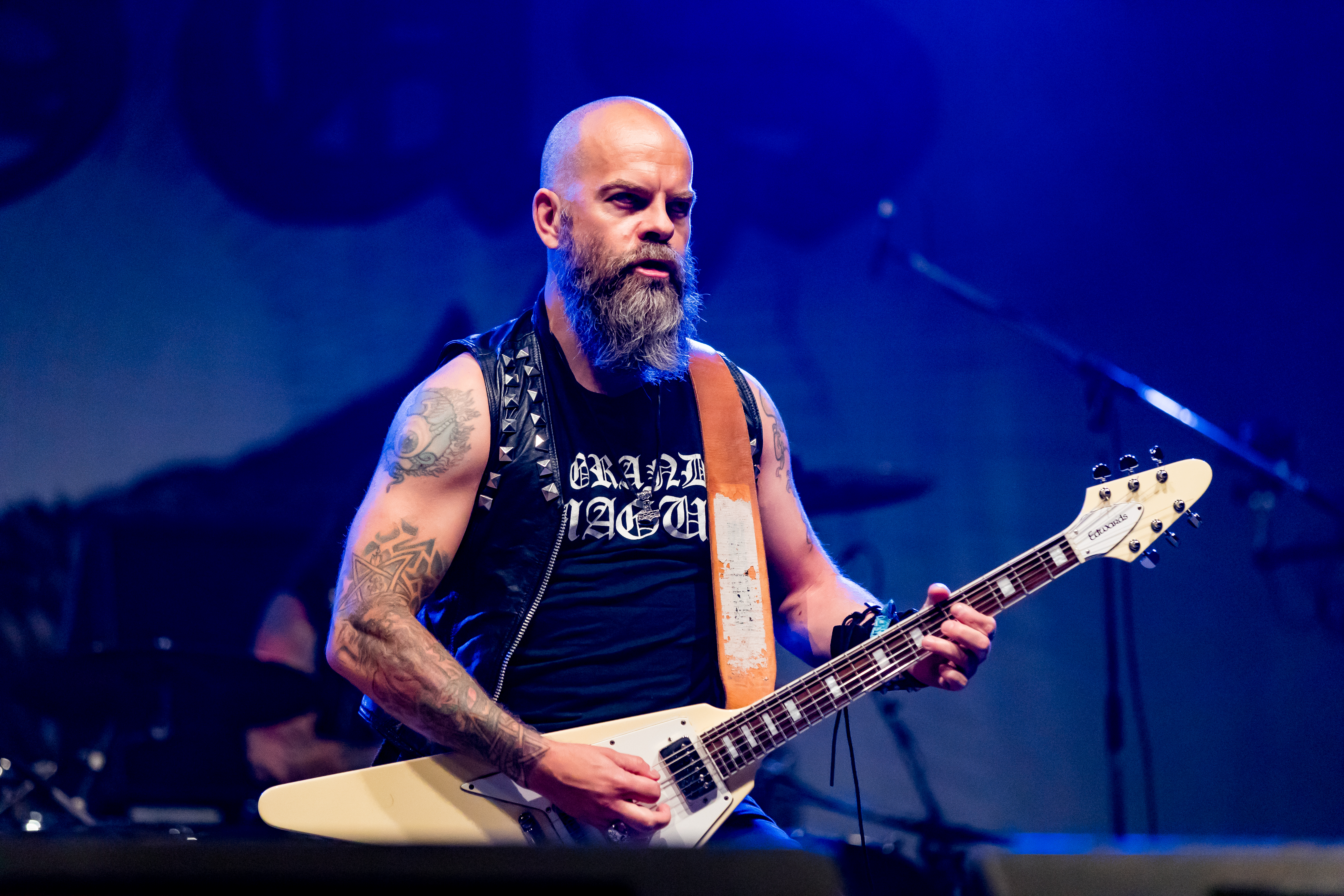 Grand Magus during Summer Breeze 2016 at , Dinkelsbühl, Bayern, Germany on 2016-08-17, Photo: Sven Mandel